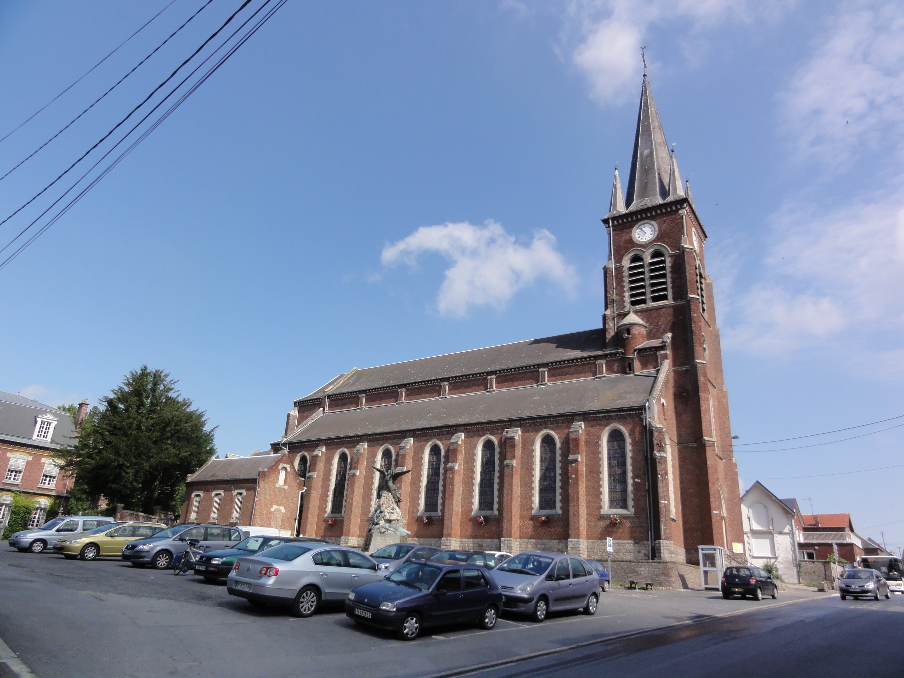 Poix-du-Nord (Nord, Fr) église, vue latérale